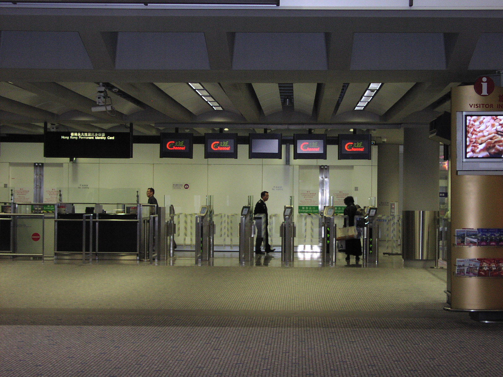 香港國際機場Bân-lâm-gú: Hiong-káng Kok-tsè Ki-tiûnn. 香港國際機場